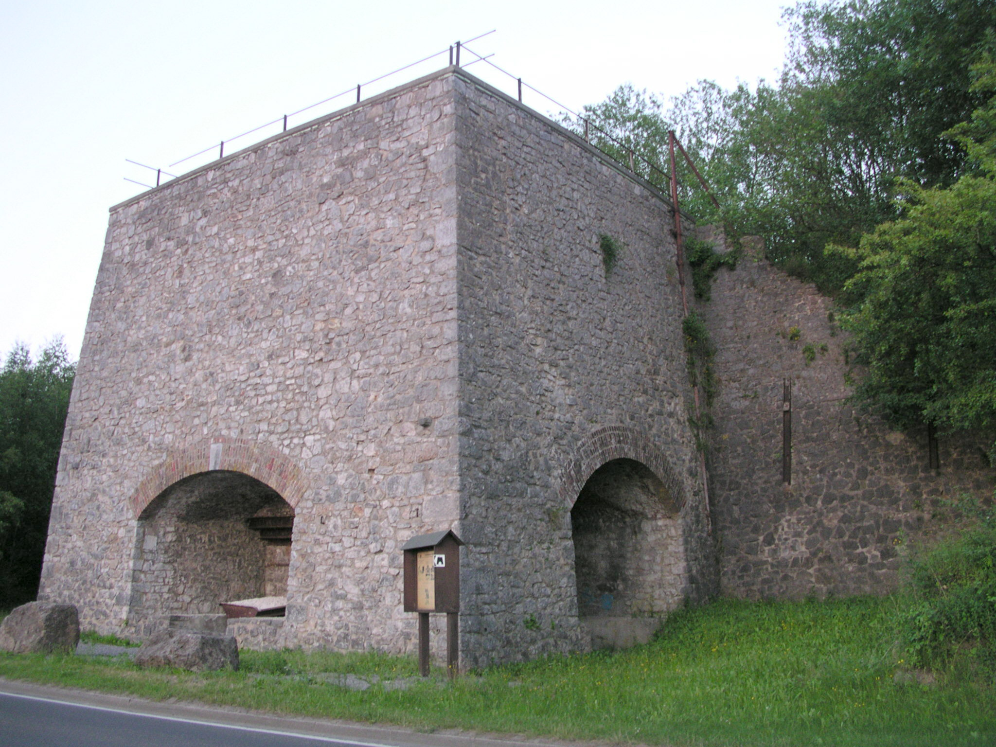 Aachen, Kalkofen Wolfspfad bei Hahn; Baujahr 1924; Baudenkmal